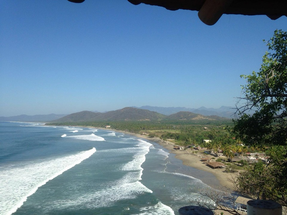 Playa con hermosos atardeceres